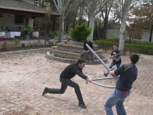 La imagen es de cámara propia.